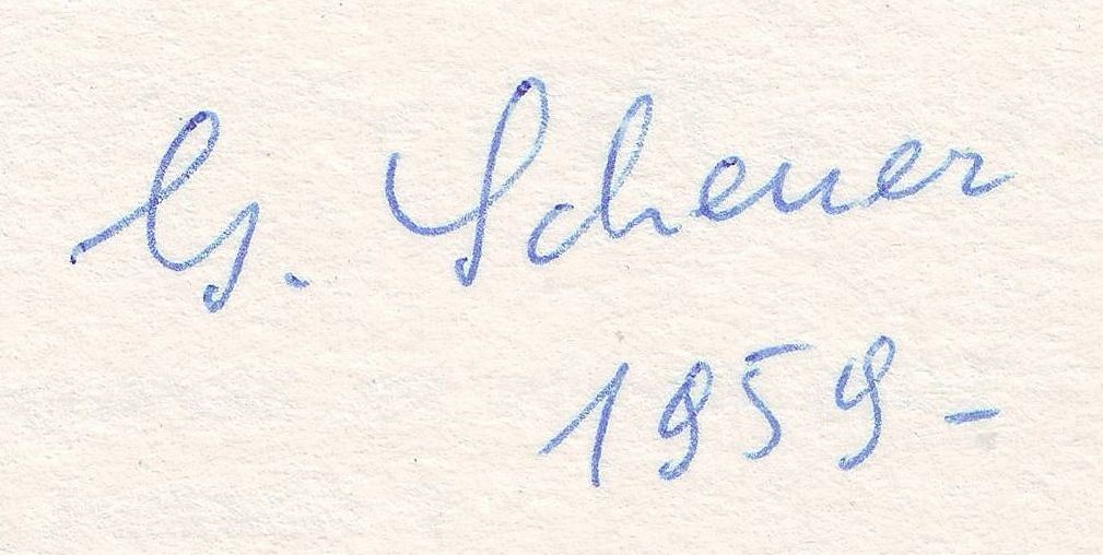 Unterschrift Georg Scheuer 1959, in Privatbesitz